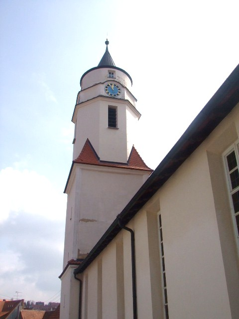 Meßstetten, Evangelische Pfarrkirche